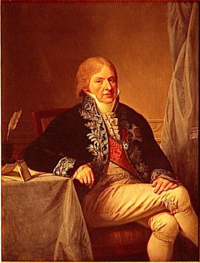 Ministre des Relations extérieures du royaume d'Italie en France de 1802 à 1805, représenté en 1813, gouverneur des Etats de Parme et Plaisance en 1814, puis ministre plénipotentiaire d'Autriche à Modène (RMN)